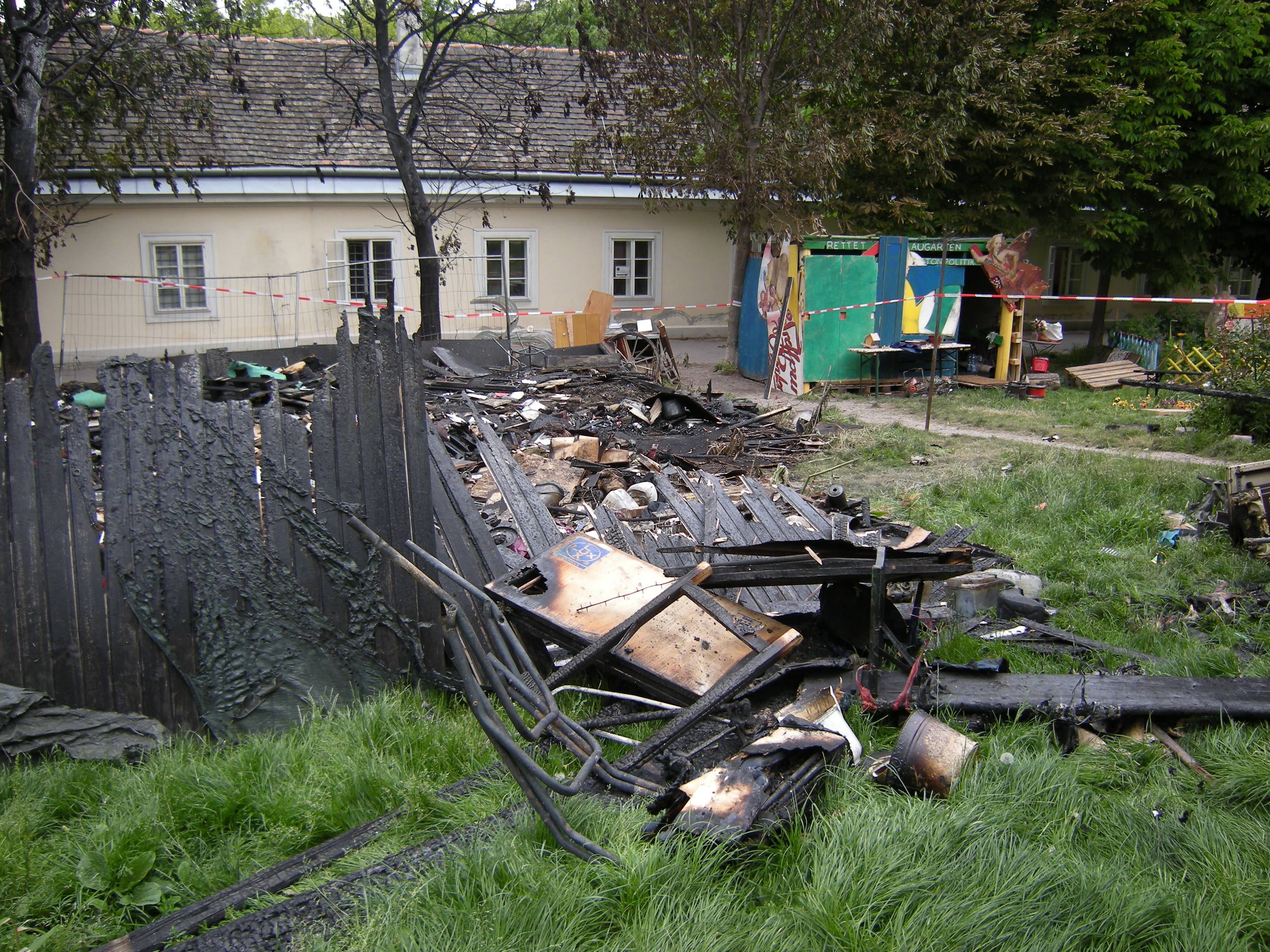 Das Widerstandszelt am Augartenspitz brannte am Morgen des 12. Mai 2014 ab. Zwar gab es keine Personenschäden, doch wurden die beiden für die Organisation wichtigen Zelte gänzlich zerstört. Die Aktivisten der Widerstandsbewegung vermuten Brandstiftung. Amtliche Untersuchungen zur Brandursache laufen. (2014-05-13)..